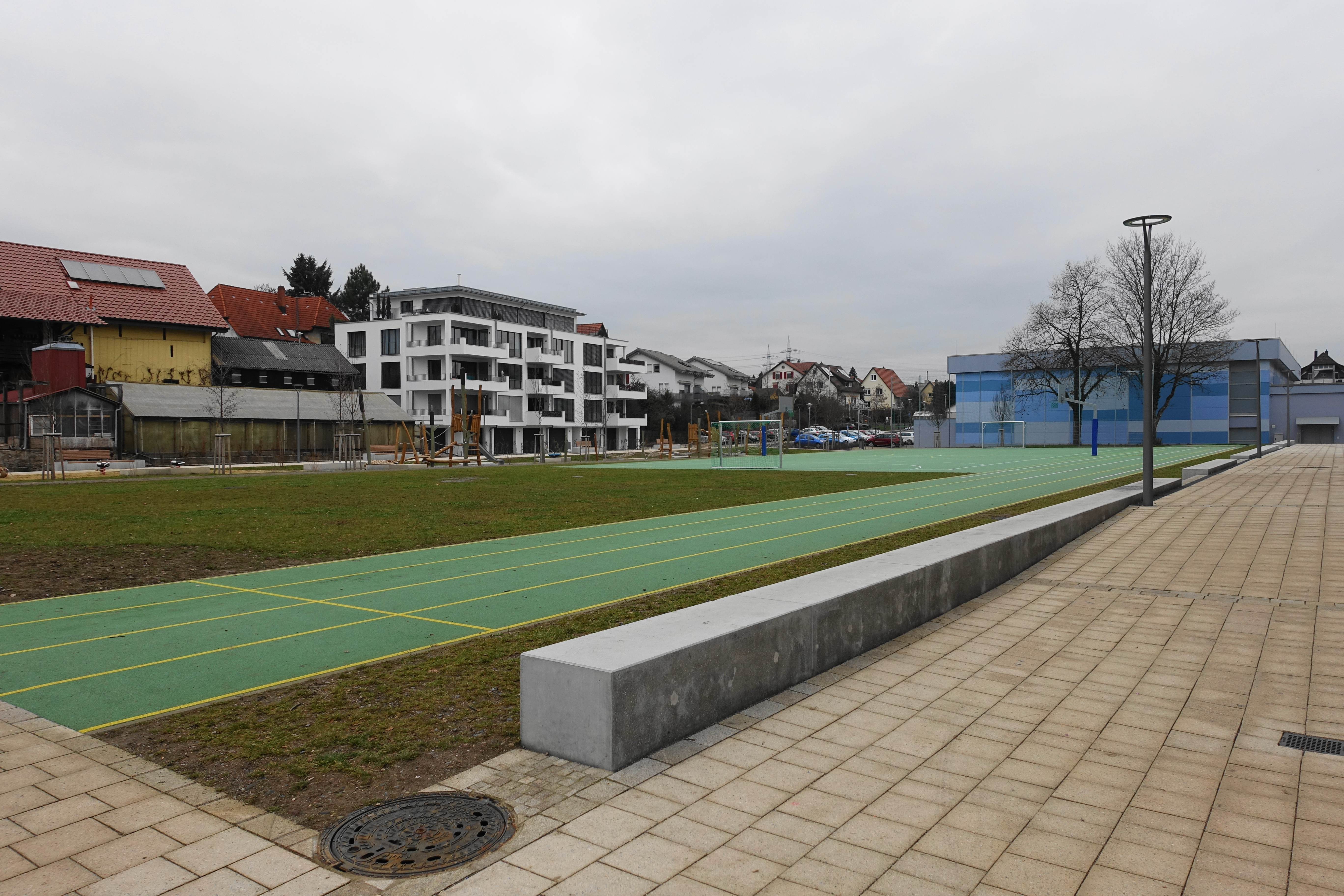 Murg (Hochrhein) Sportanlage